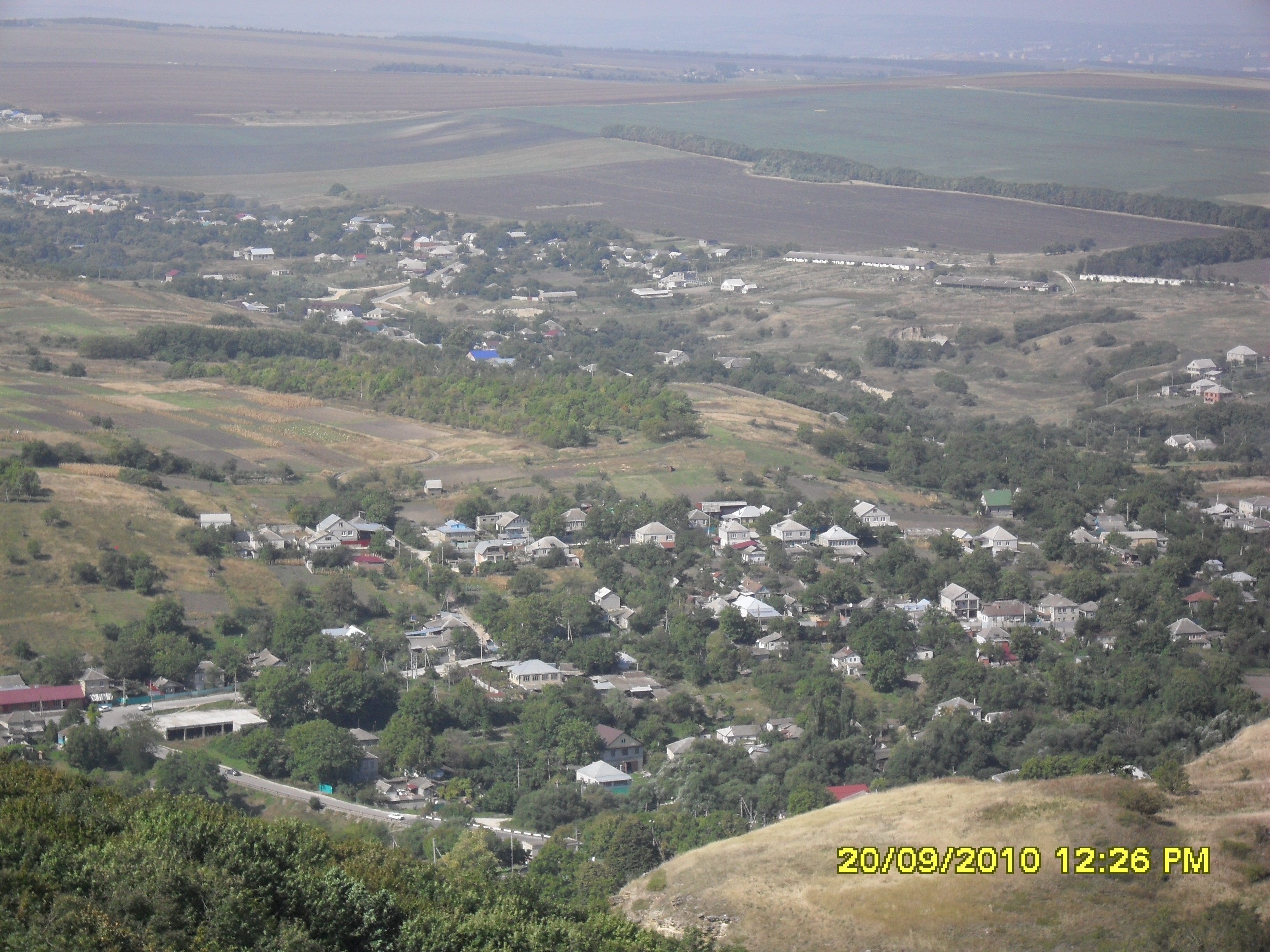 Панарама села Юца